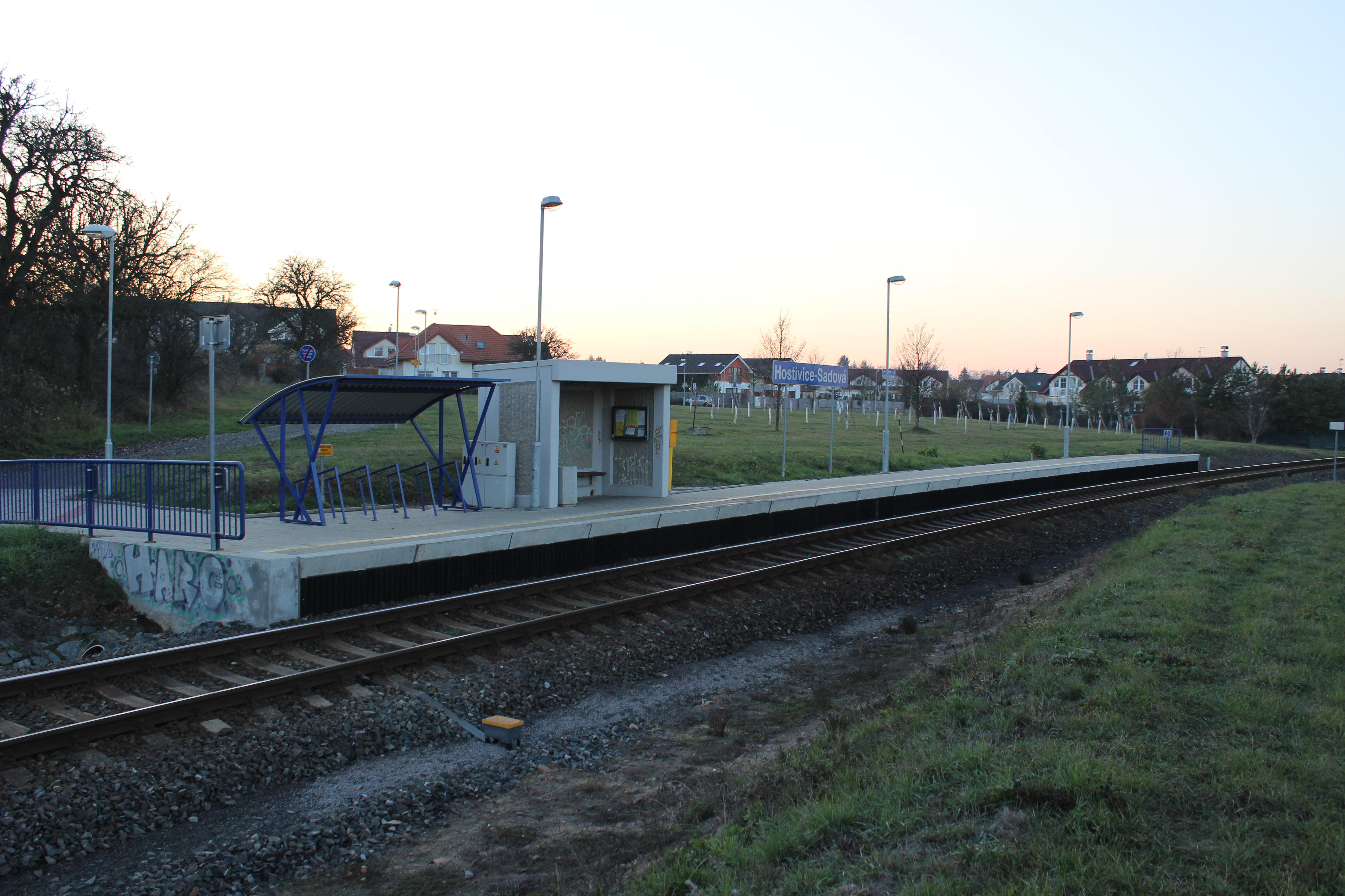 Východní pohled na železniční zastávku Hostivice-Sadová.